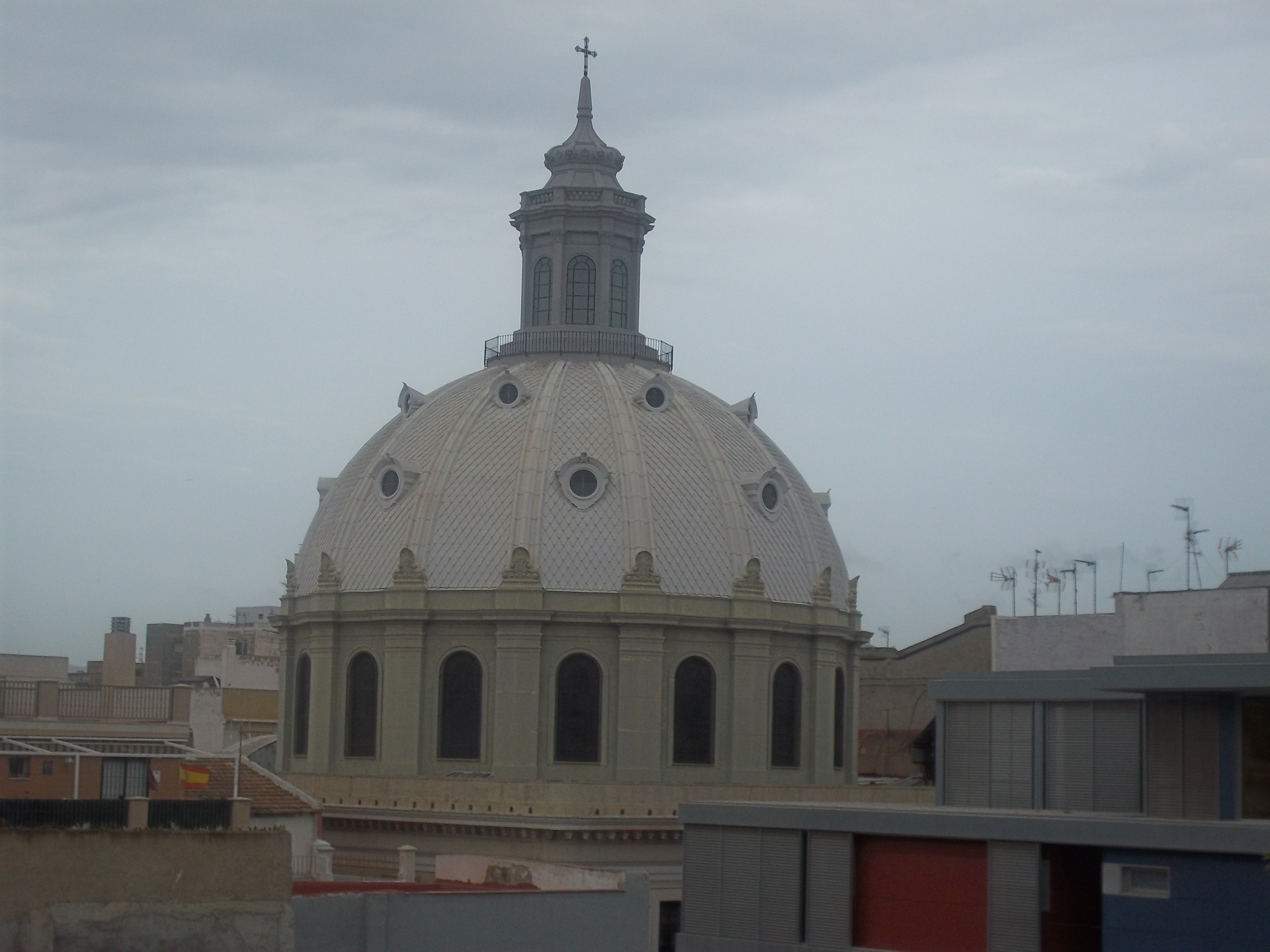 Cúpula de la iglesia de la Caridad, vista desde el Molinete (Cartagena, España).